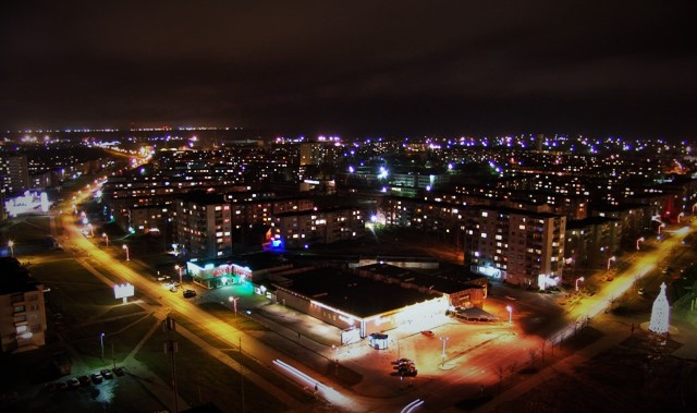 Žemaitijos gatvė